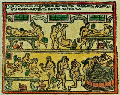 Девки в бане (лубок 18 в.)